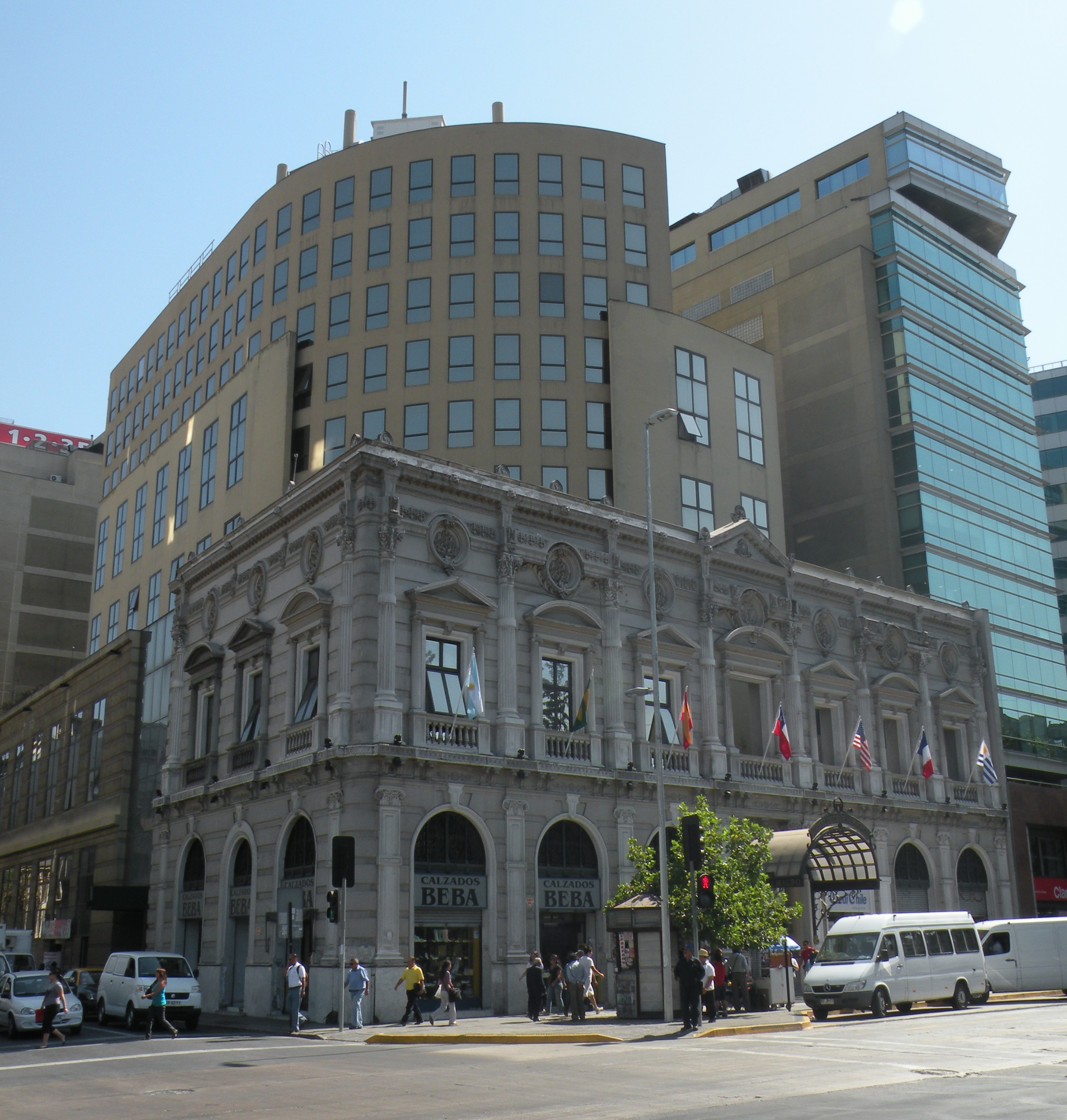 Palacio Rivas, actual Hotel Diego de Almagro.